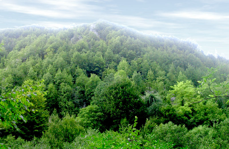 Tara National Park, Serbia